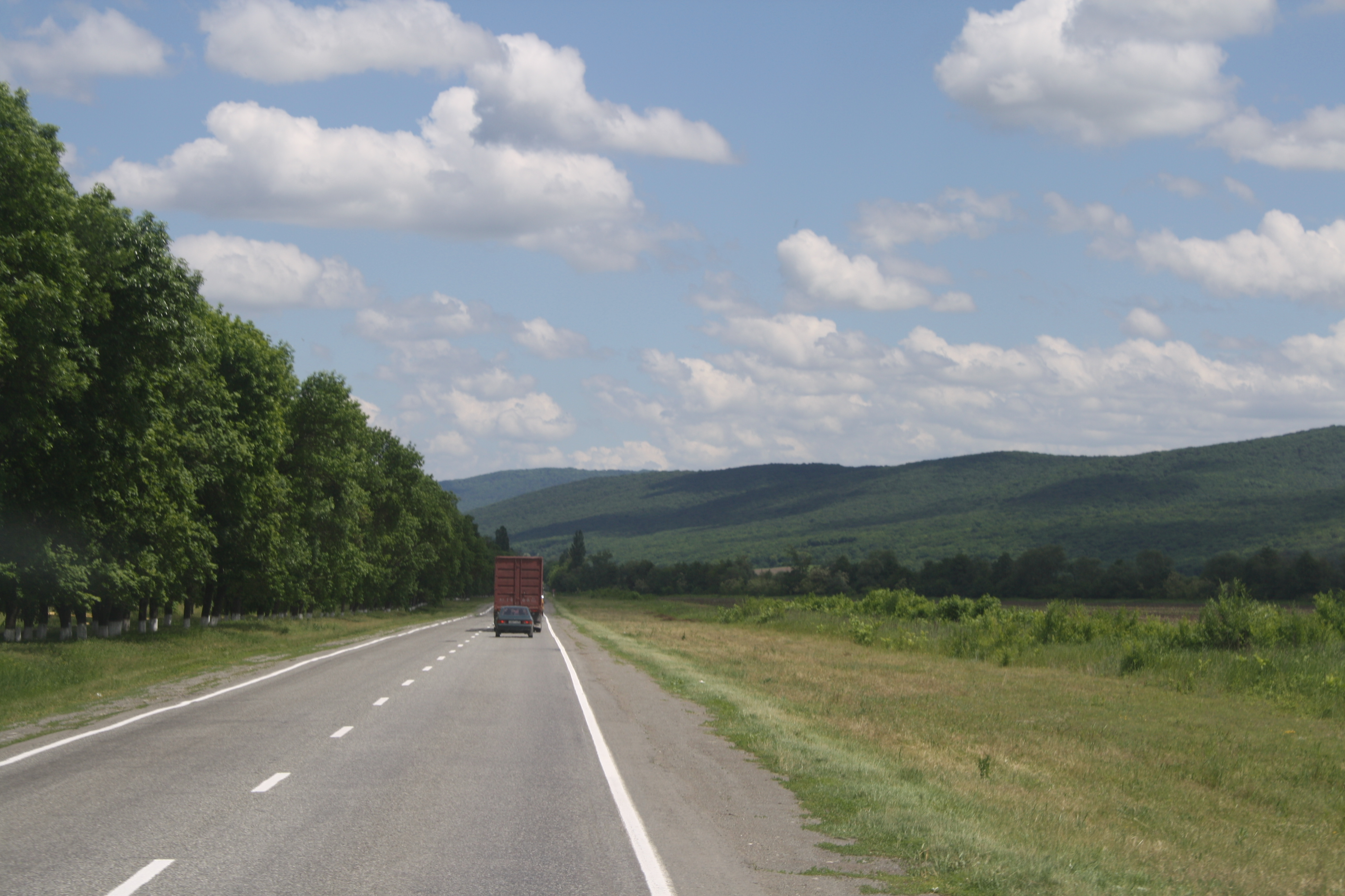 North Ossetia. Russia. Северная Осетия. Россия